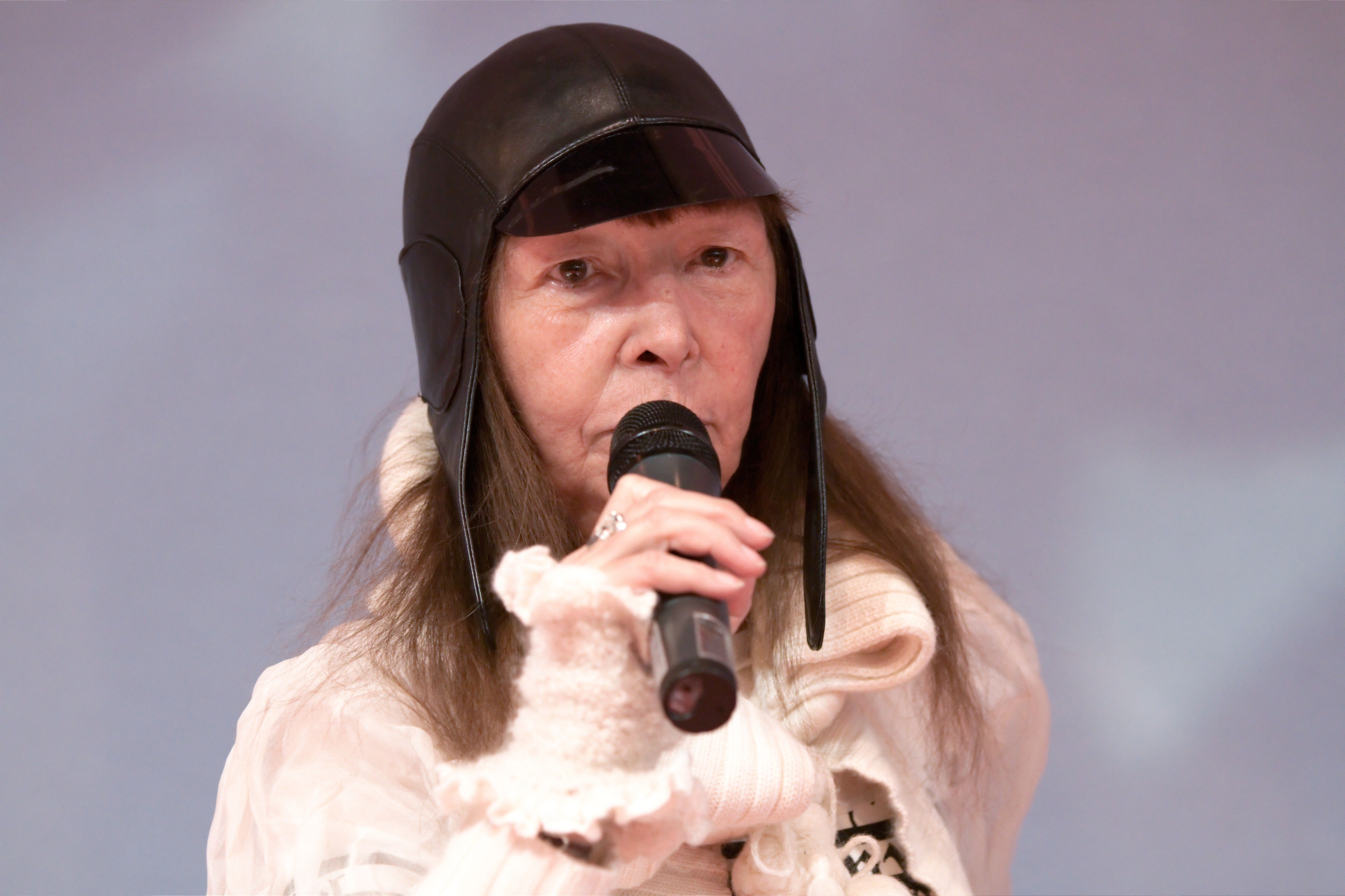 Brigitte Fontaine au Salon du livre de Paris pour une lecture de quelques-uns de ses poèmes.